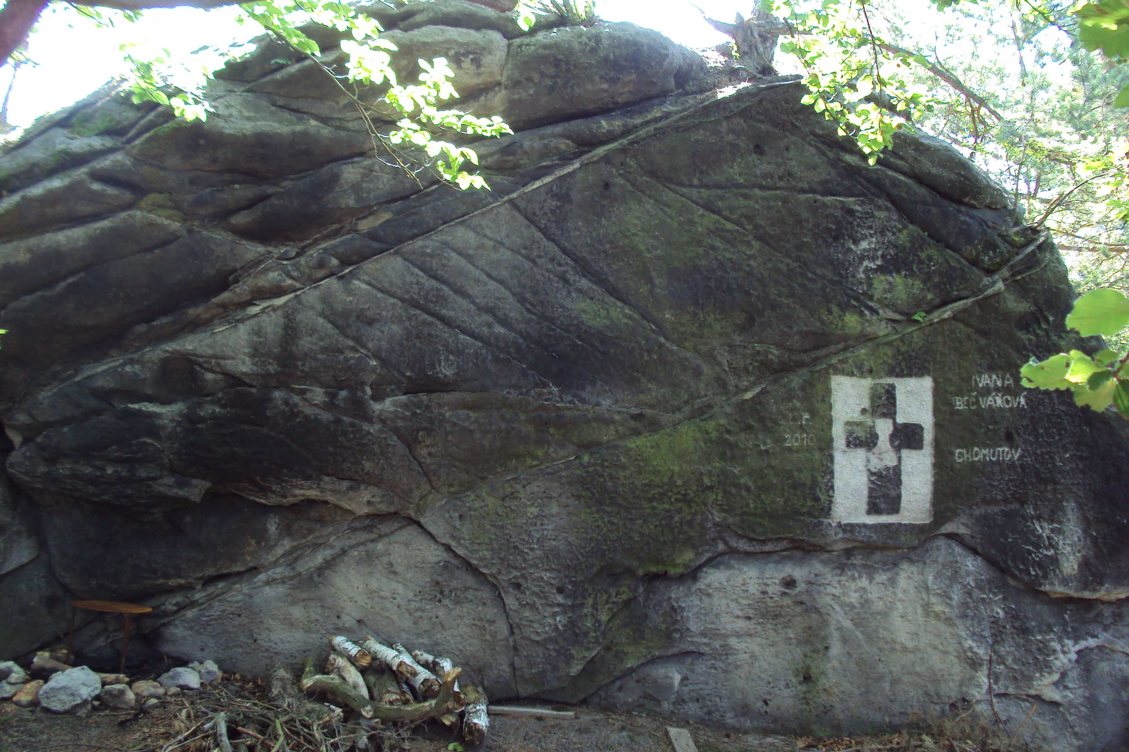 Zřícenina hrádku pod osadou Hvězda na skále u vodárny